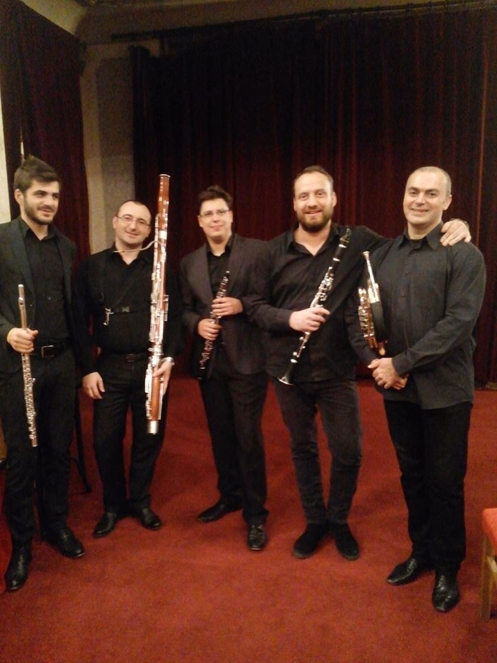 Bucharest Winds